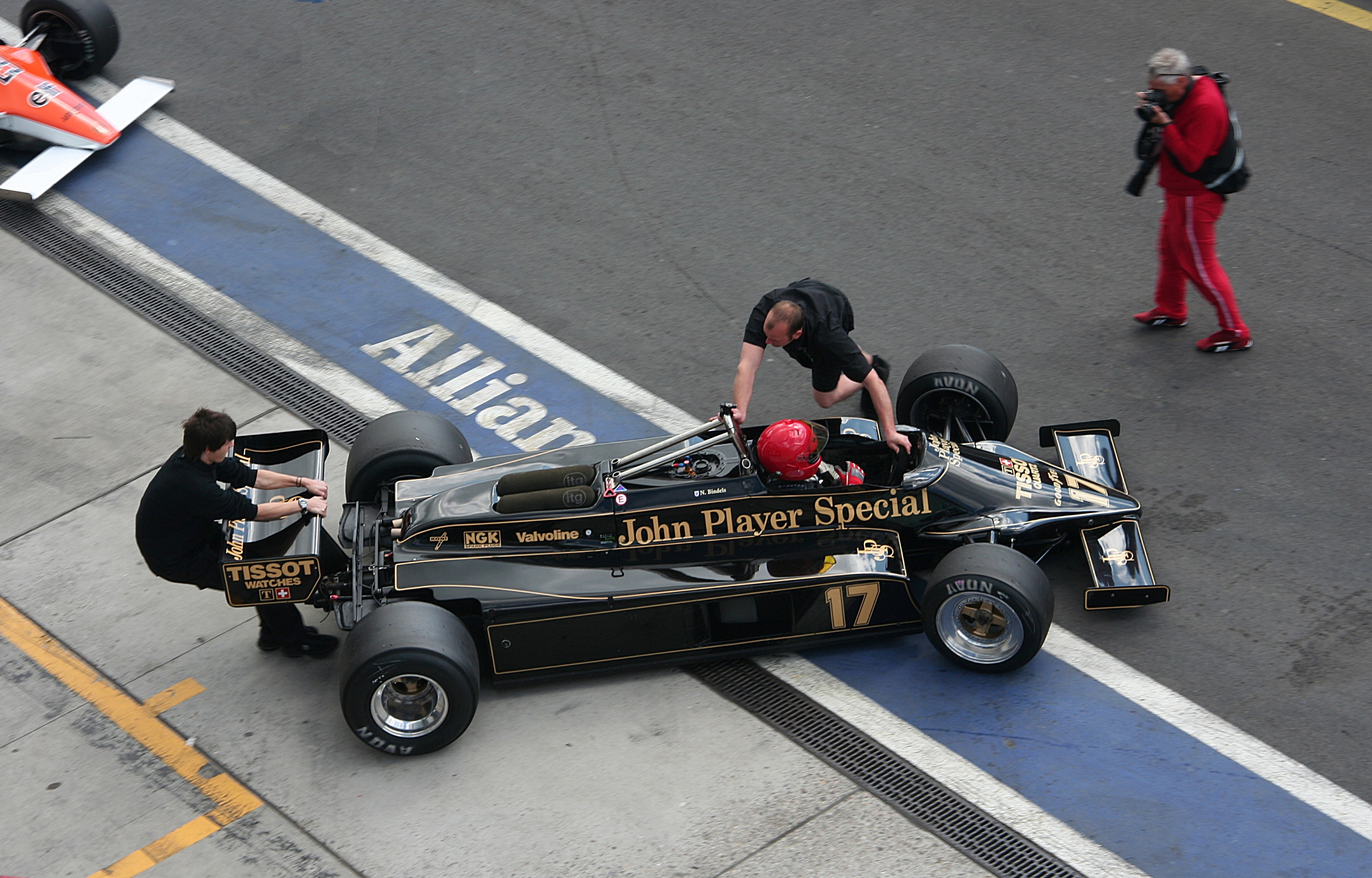 Lotus 87B von 1982 beim Oldtimer Festival des DAMC an den Boxen des Nürburgrings